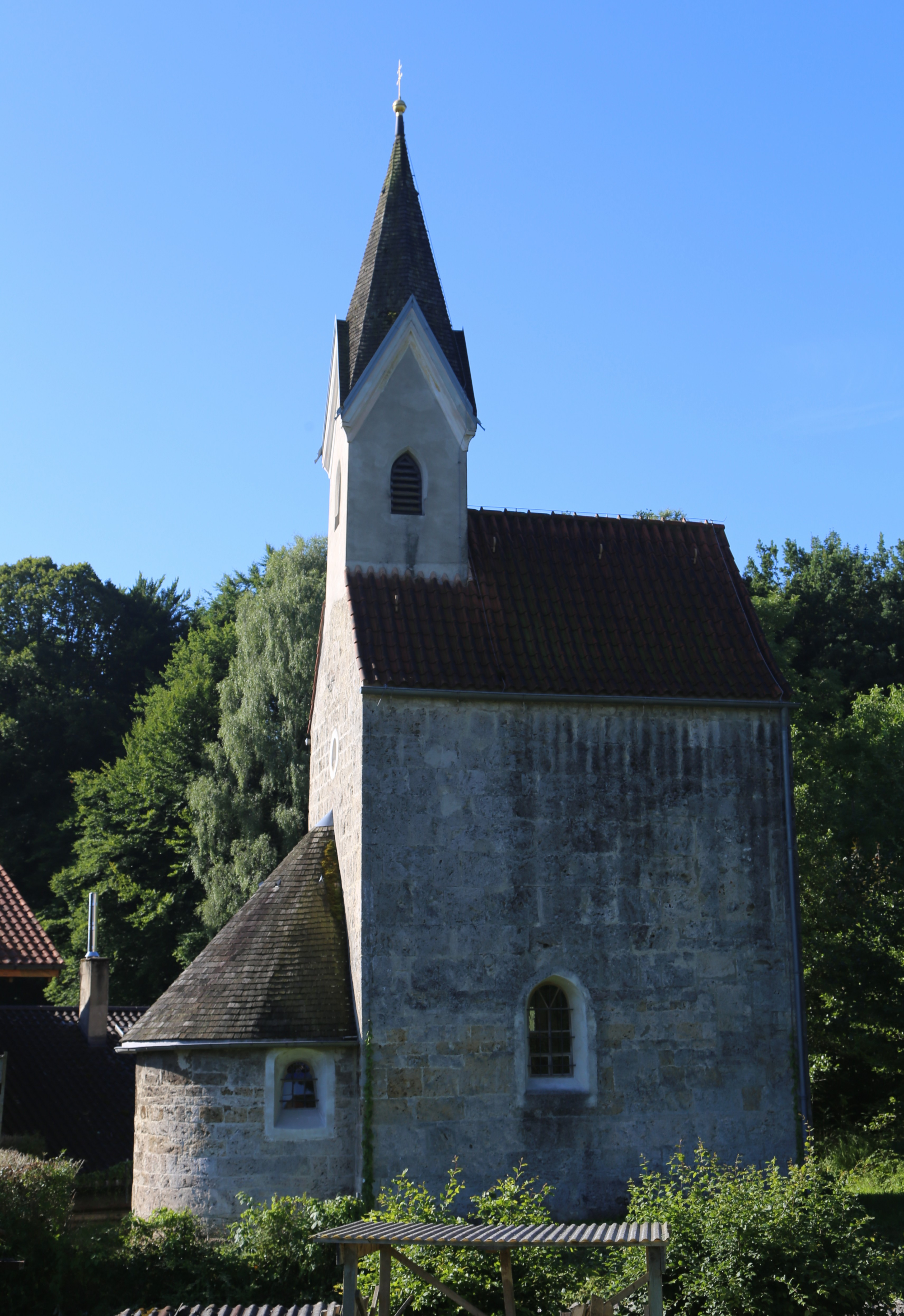 Thal 24, Tuntenhausen; Kath. Filialkirche St. Georg, doppelgeschossiger romanischer Tuffquaderbau mit neugotischem Dachreiter, rechteckiger Satteldachbau mit eingezogener, hufeisenförmiger Apsis, im Kern 11. Jh; mit Ausstattung.